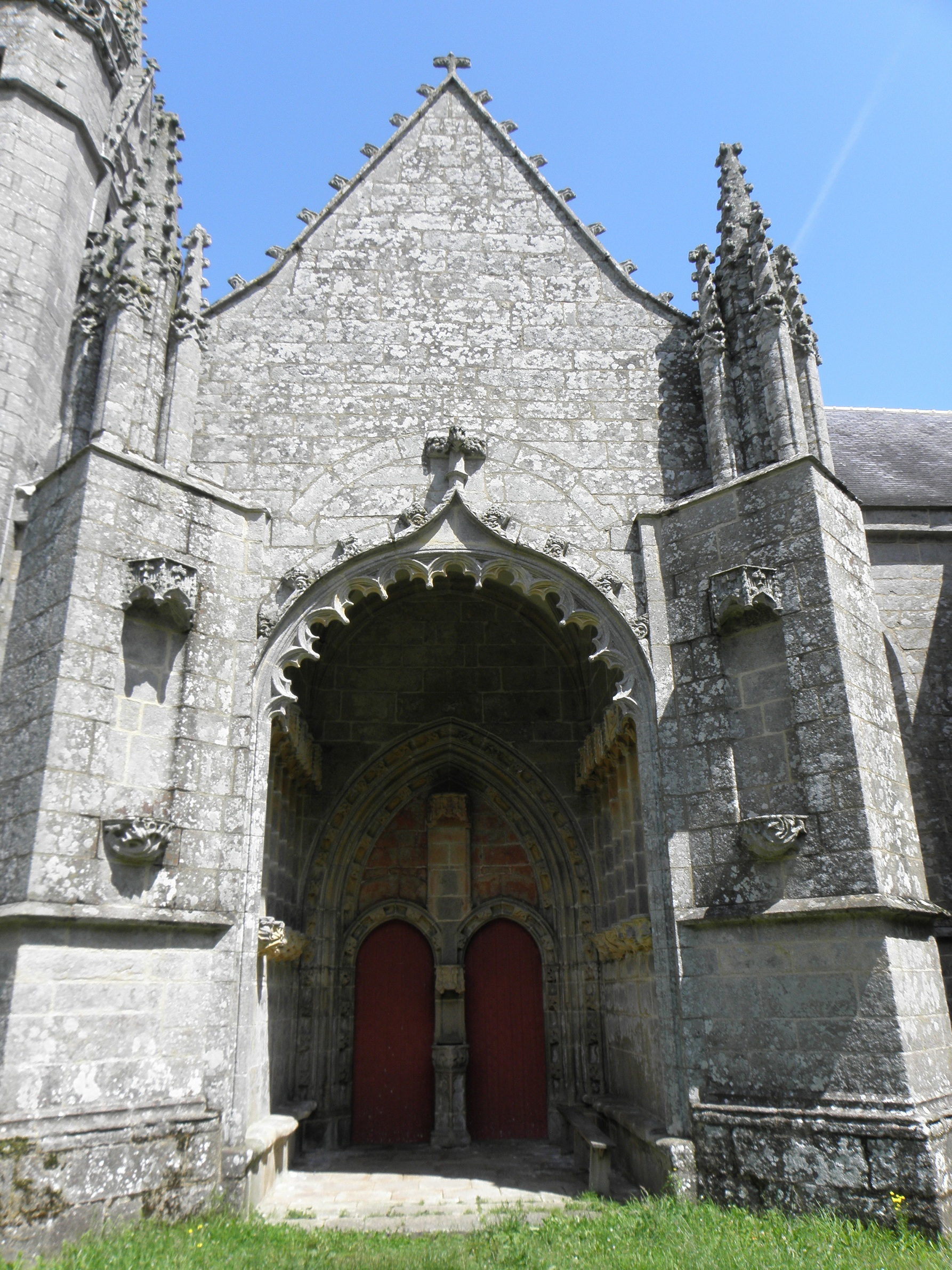 Porche sud de la chapelle saint-Fiacre du Faouët (56). .